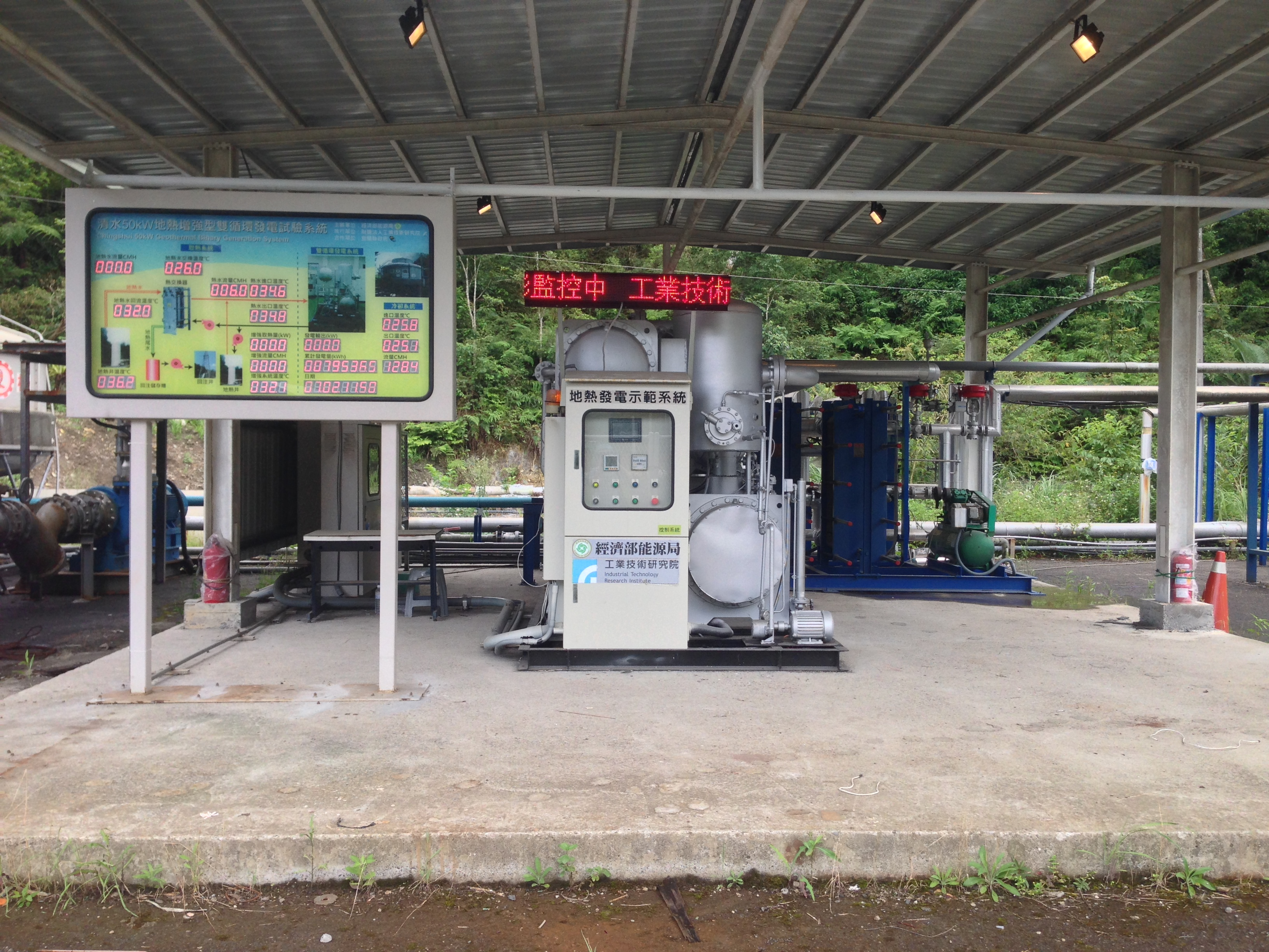 中文（台灣）: 清水地熱發電廠設施